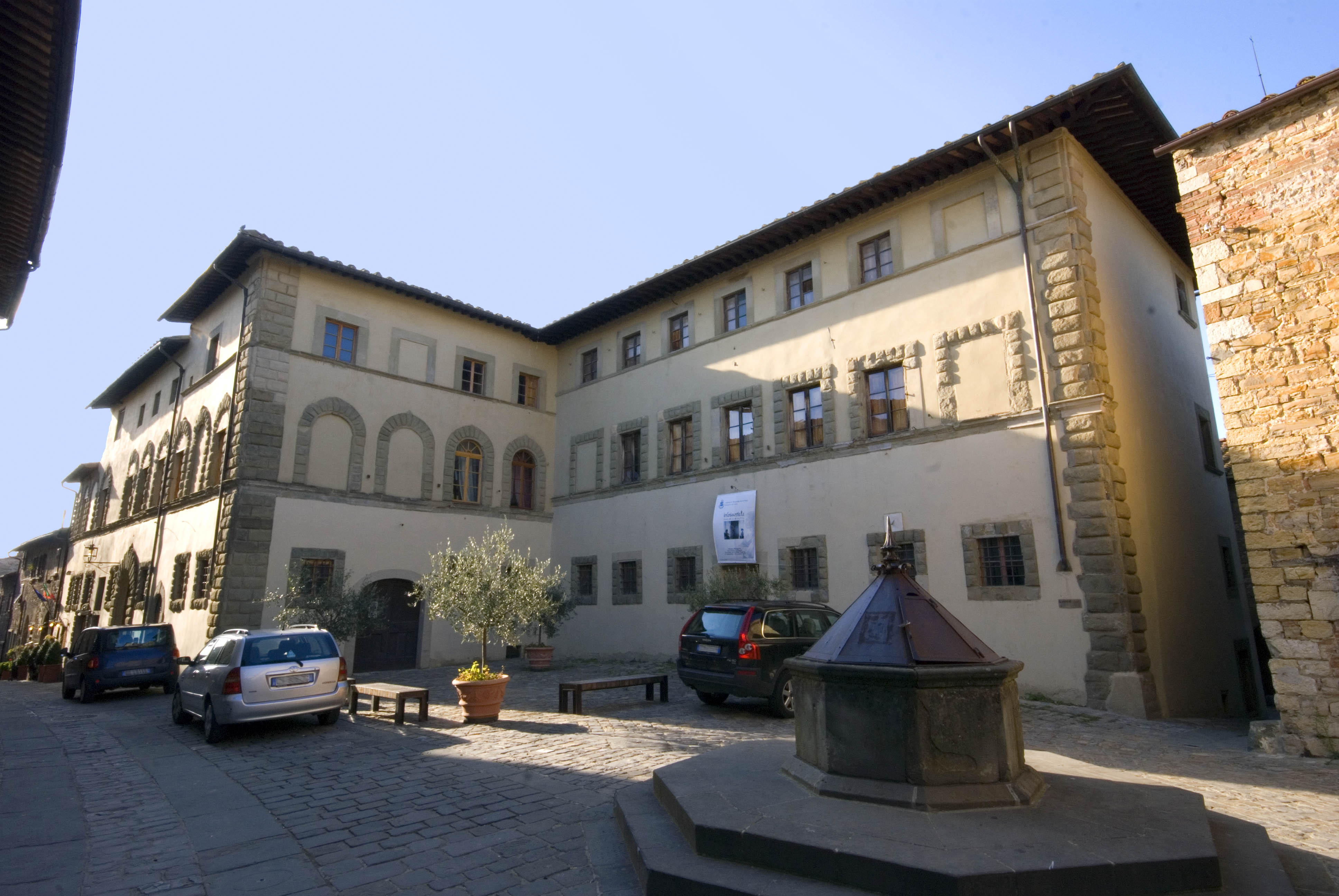 palazzo Malaspina a san donato in poggio